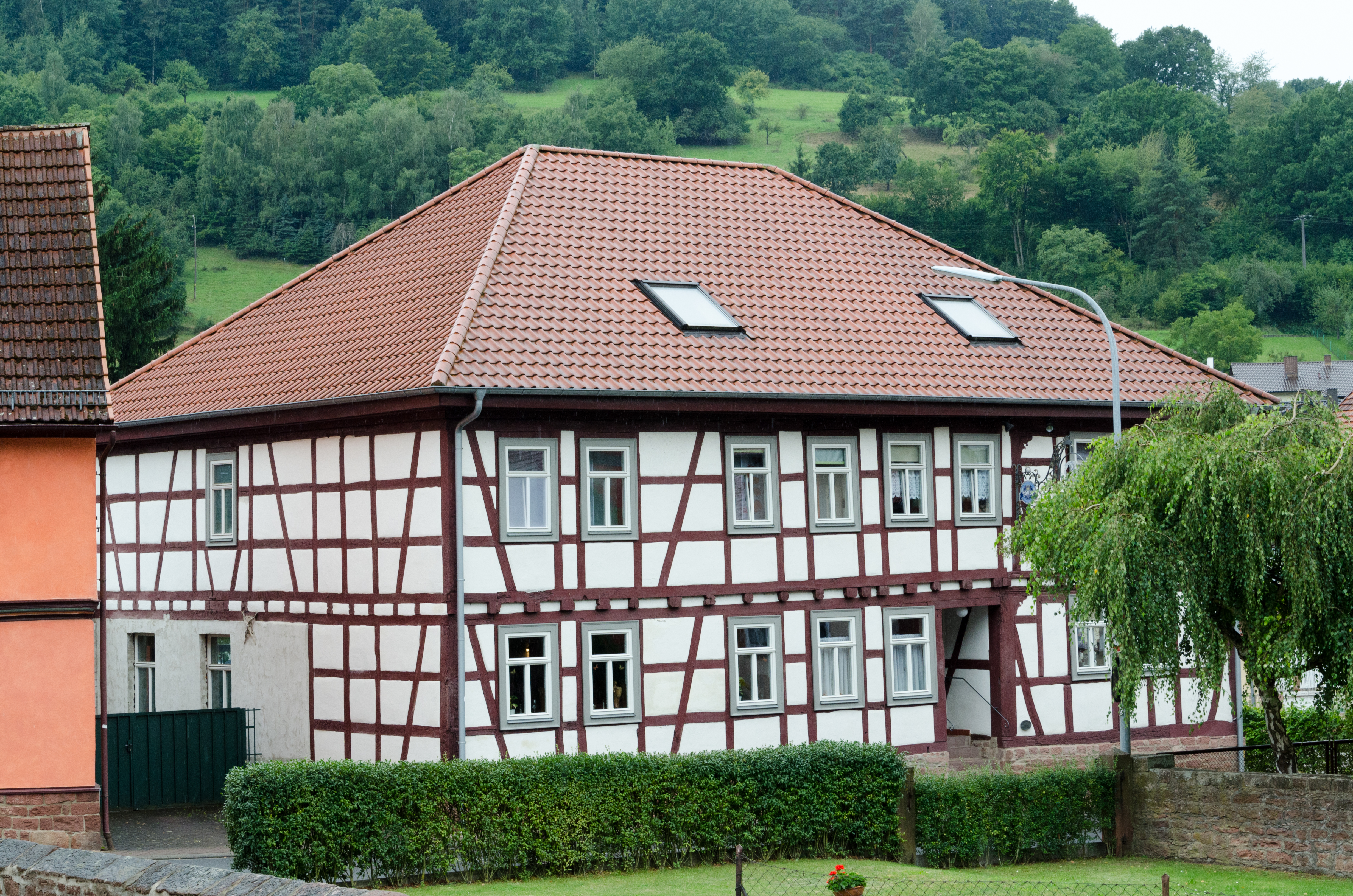 Eichenbühl, Hauptstraße 161